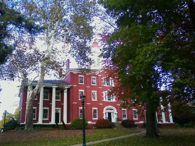 Outside Bentley Hall.